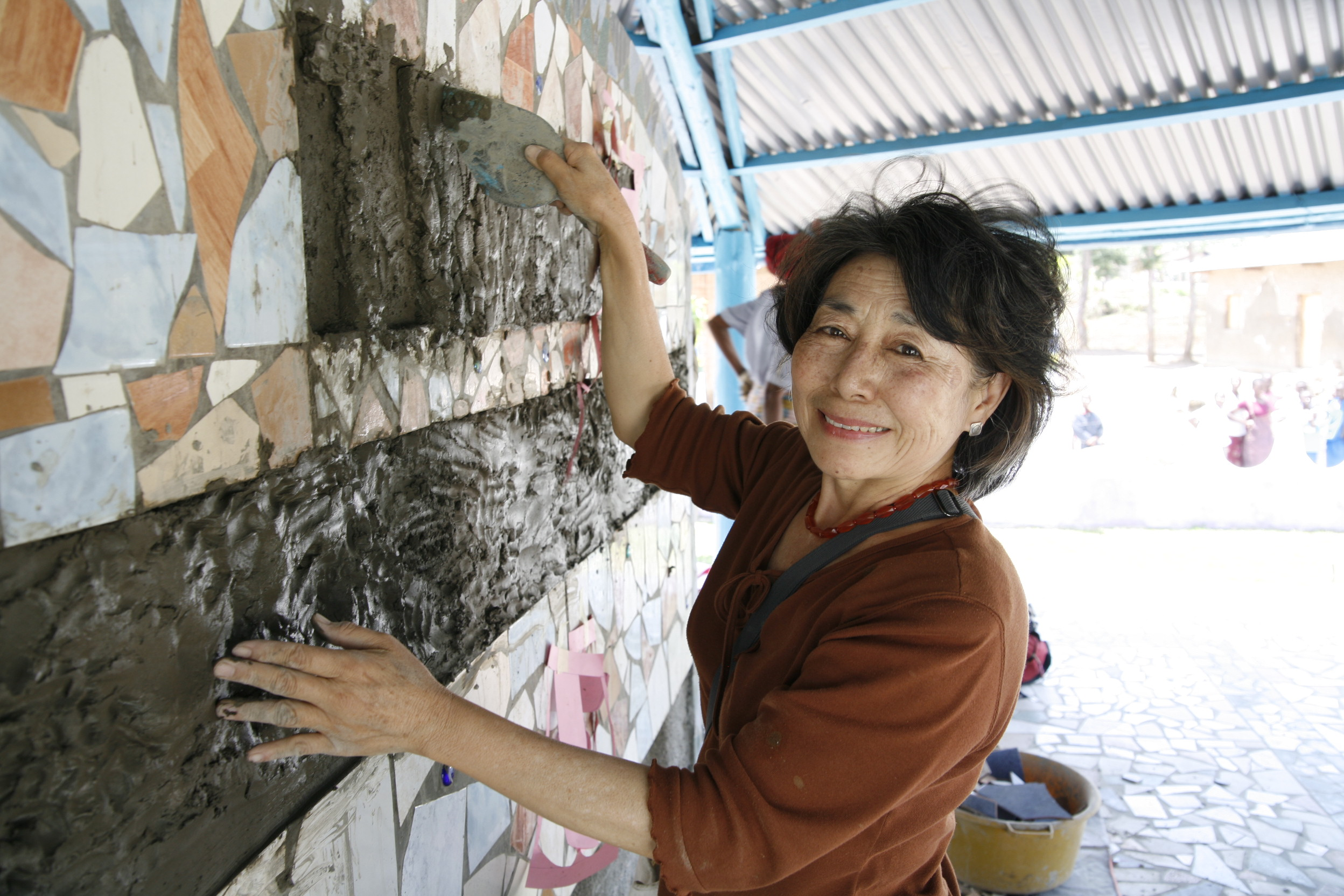 Porträt der Künstlerin und Malerin Lily Yeh